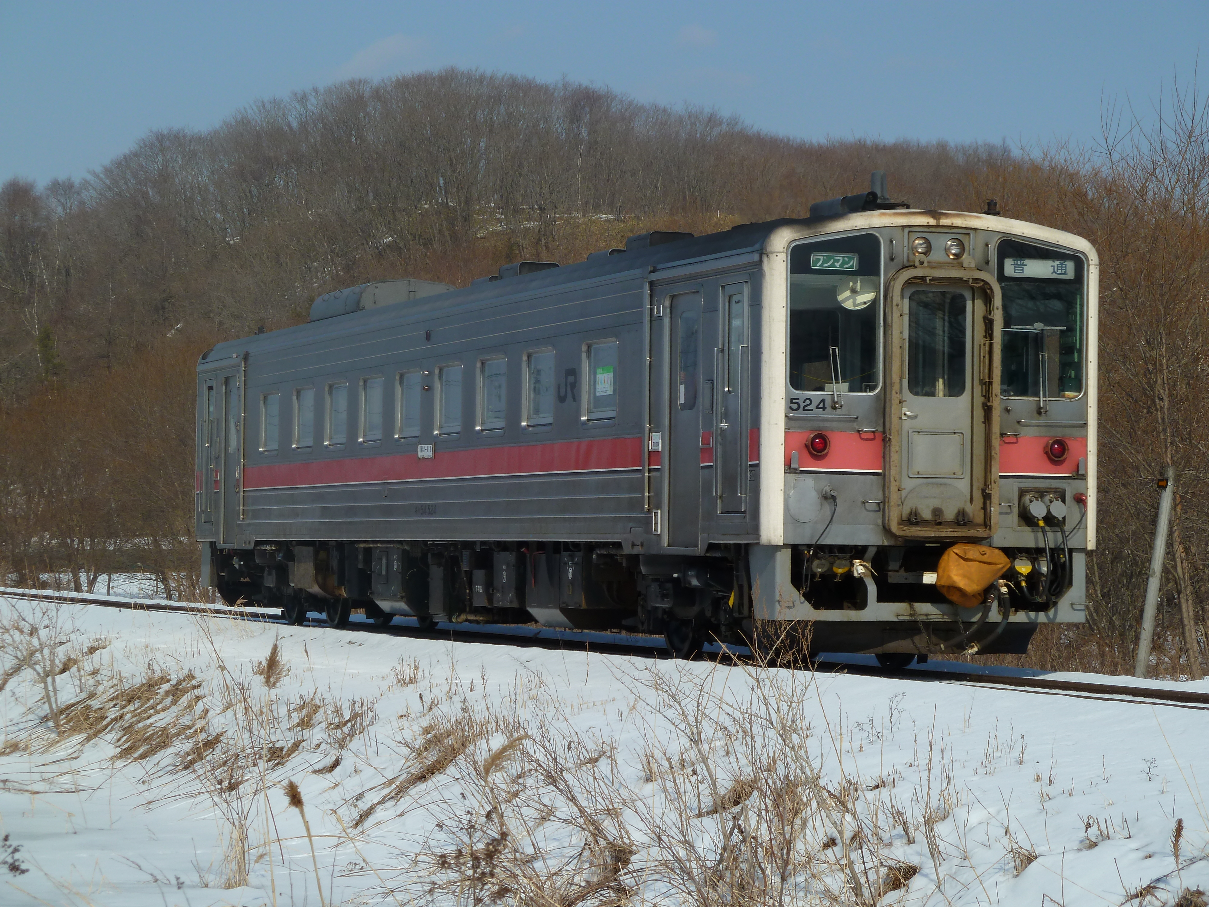 JR北海道キハ54形気動車（キハ54 524）JR北海道釧網本線、東釧路駅 - 遠矢駅間で撮影